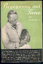 thumbnail of Cover of old book by Bastian Schmid, 1938